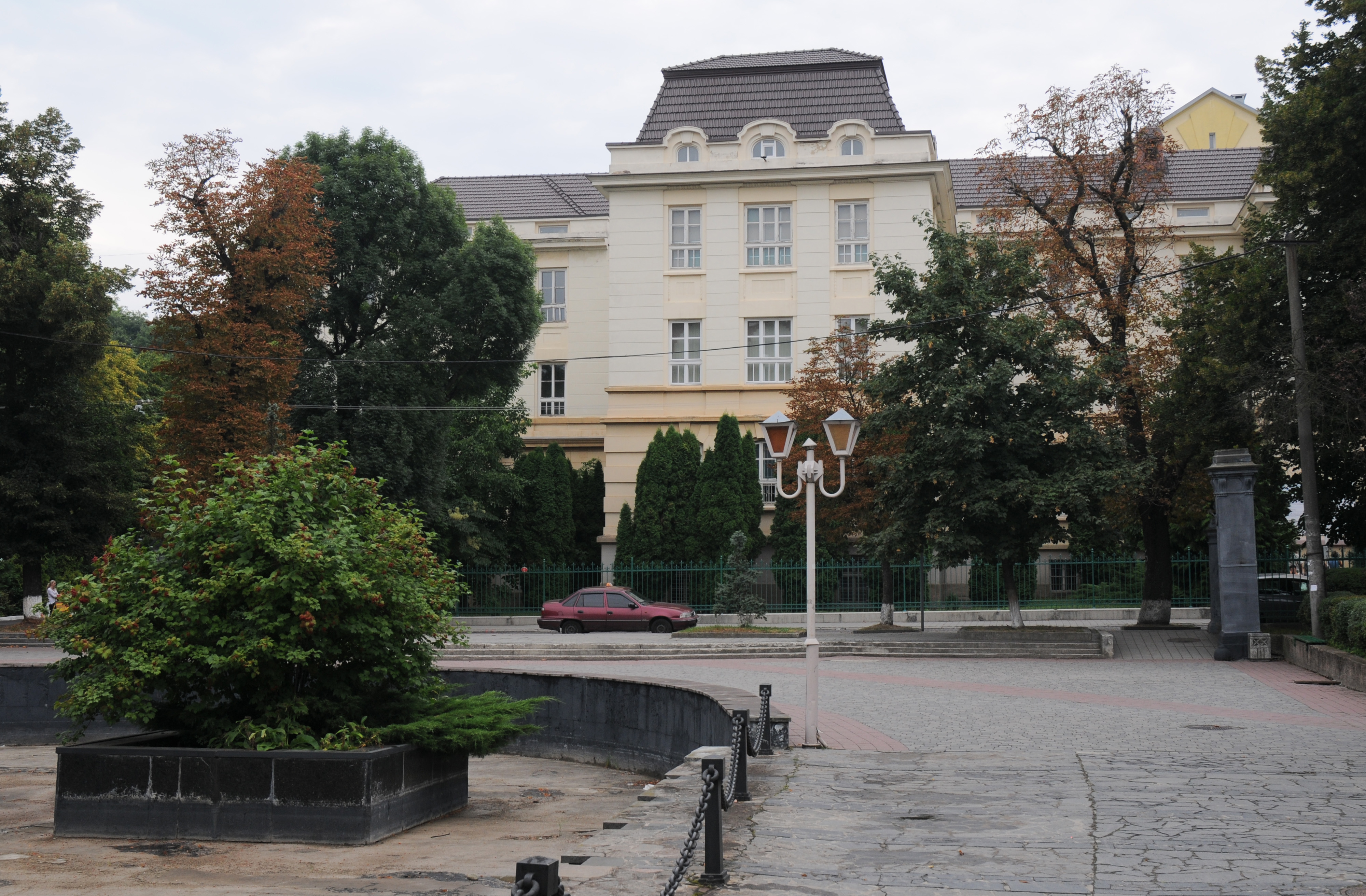 Львів, Пекарська, 69